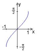 Graf funkce arkus sinus.